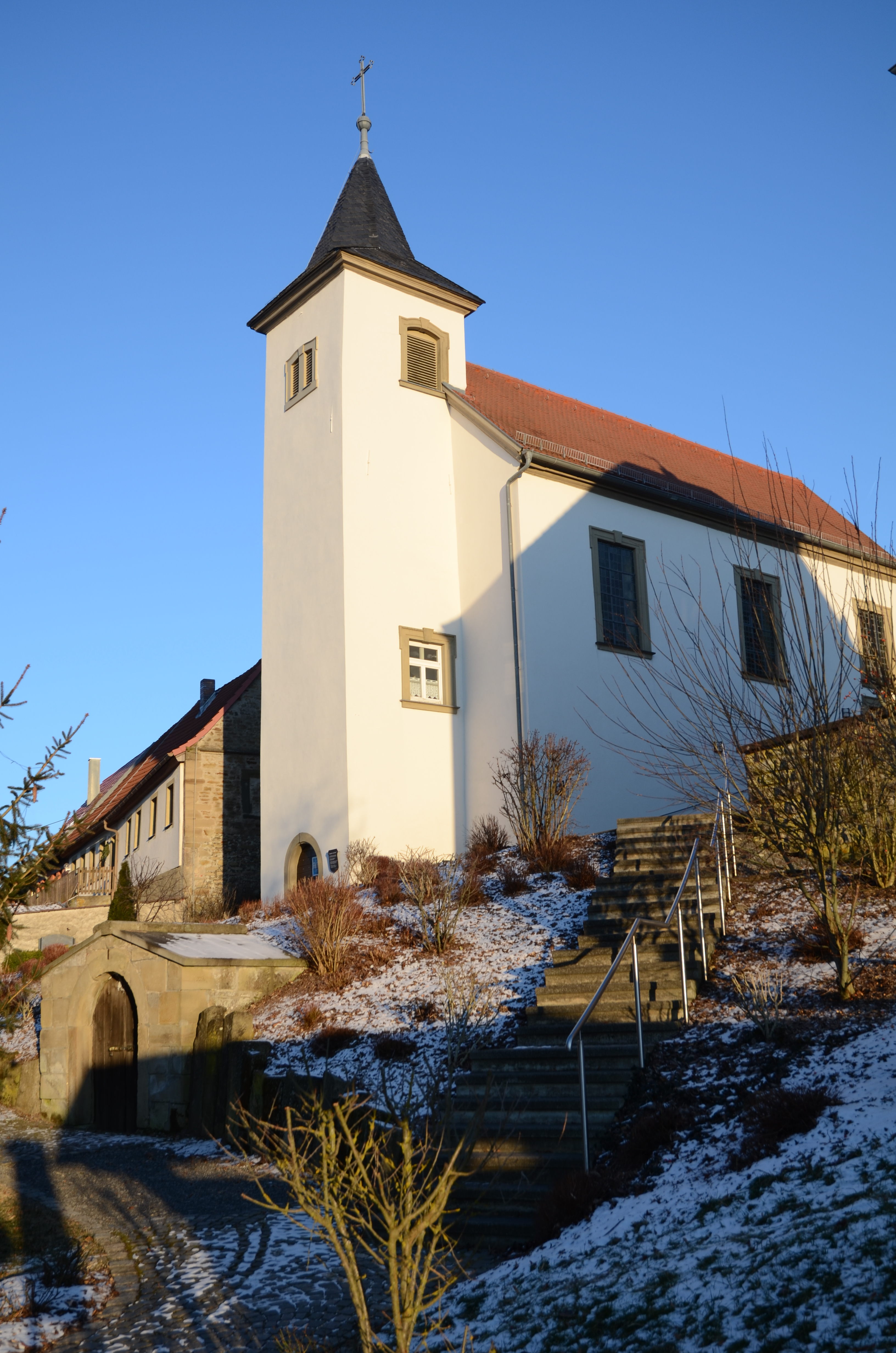 Evang.-Luth. Kirche Thundorf i. Ufr.